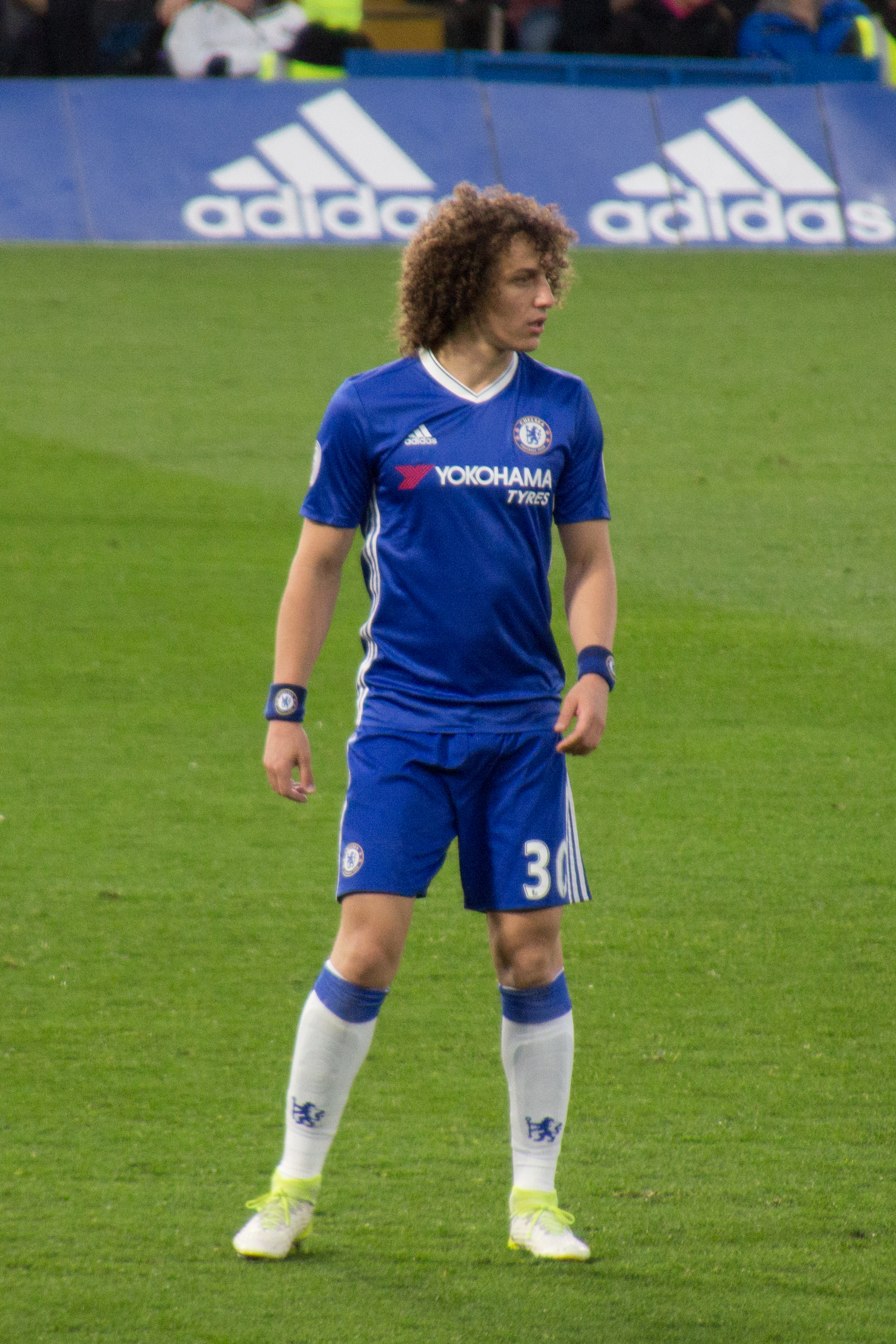 Chelsea 3 Middlesbrough 0